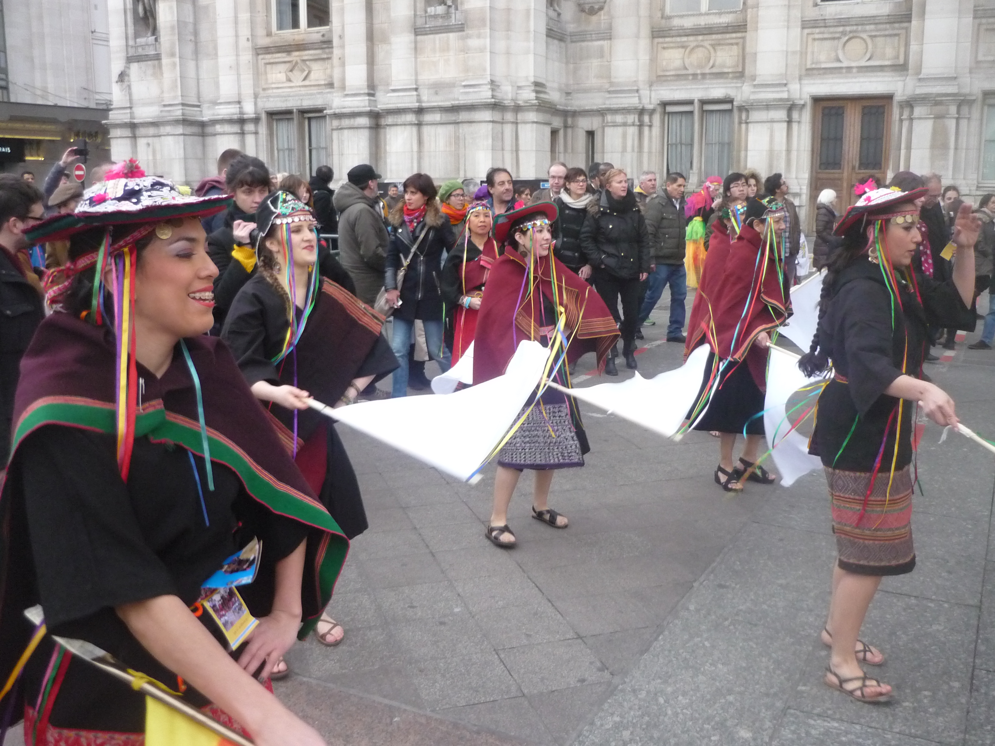 Boliviens place de l'Hôtel-de-Ville - Paris